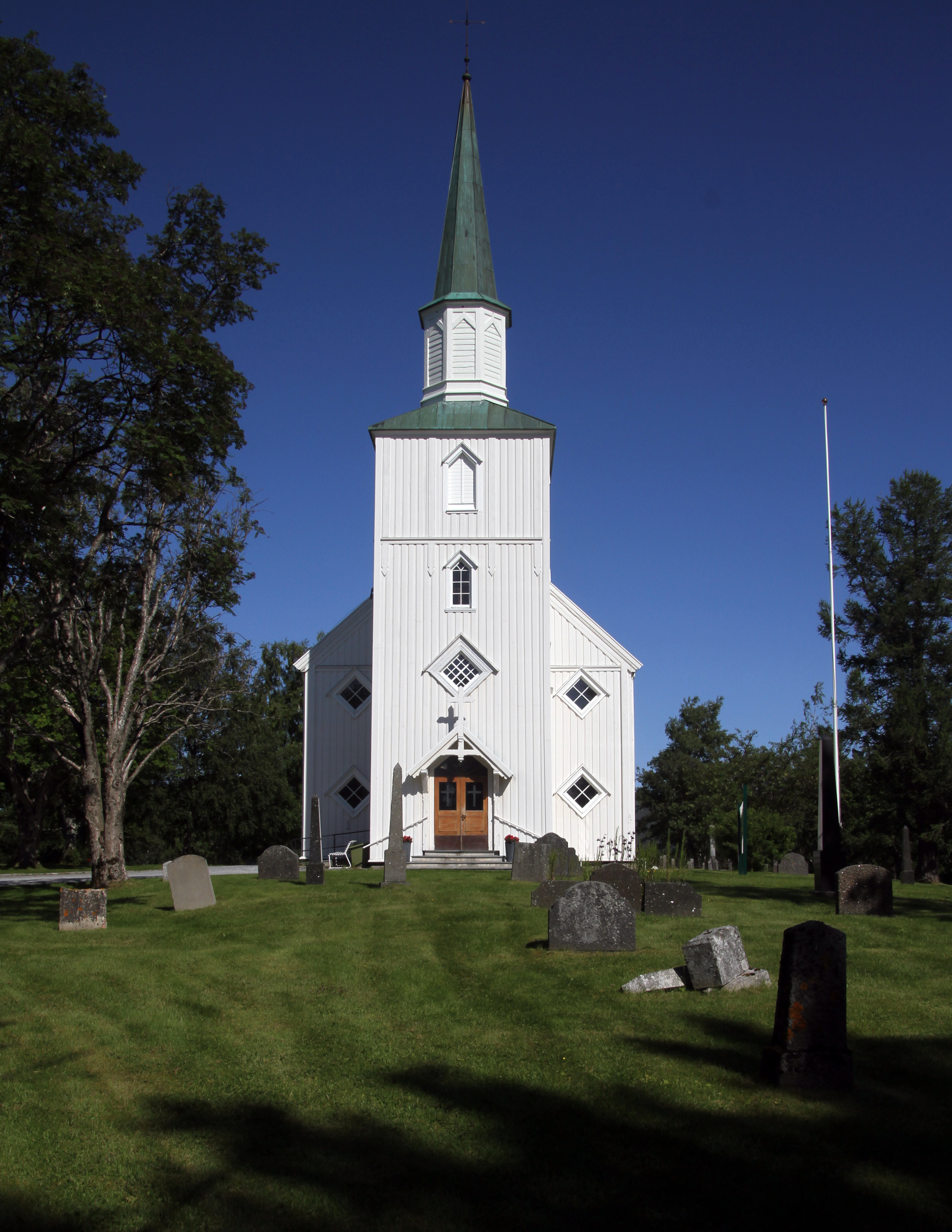 Kirche in Fauske in Norwegen